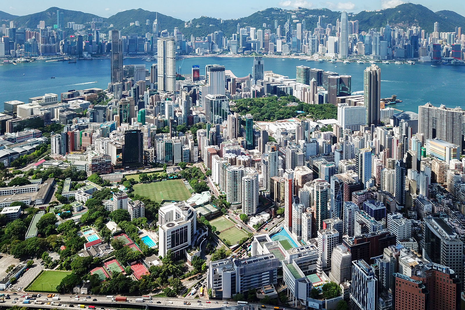 Jordan Overview